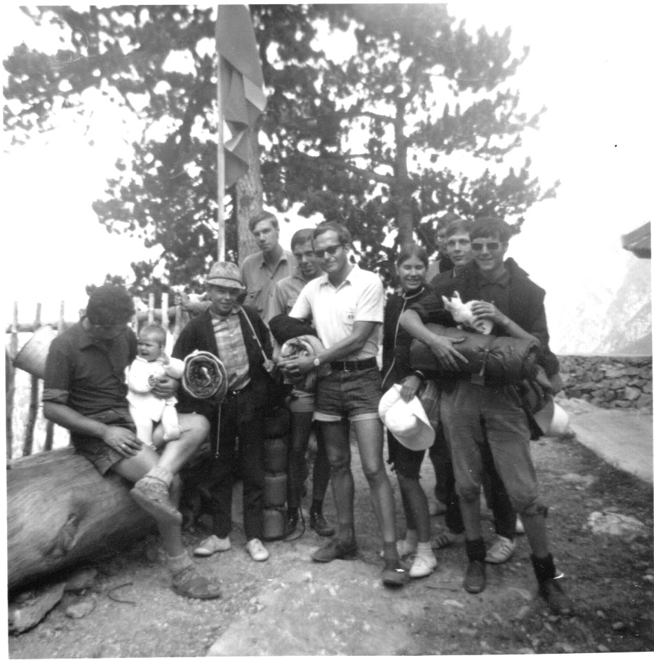 Porträt R. Beile, Pfarrer und Jugendführer in Jestetten (Klettgau). Hellasfahrt der Evang. Jugend Grenzland, 1968, Olymp-Besteigung, Hütte unterhalb des Gipfels. Links der Hüttenwart mit Baby.